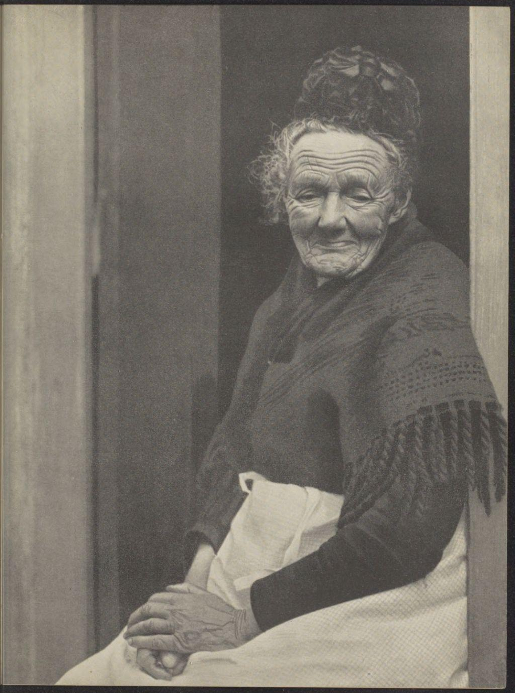 Portretstudie door Toni Arens-Tepe. "X. Weduwe op een hofje 83jr" Uit: Het is bij den avond. Een bundel novellen van J.K. van Eerbeek, L.M. Hagen, H.J. Heijnes, Diet Kramer, P. Keuning, Hendrika Kuyper-Van Oordt, C. Rijnsdorp, Anne de Vries, J.M. Westerbrink-Wirtz en Wilma. Met portretstudies van T. Arens-Tepe en met een inleidend artikel van A.M. de Vries Robbé-Bergmans. Uitgegeven door Bosch en Keuning te Baarn [1932].